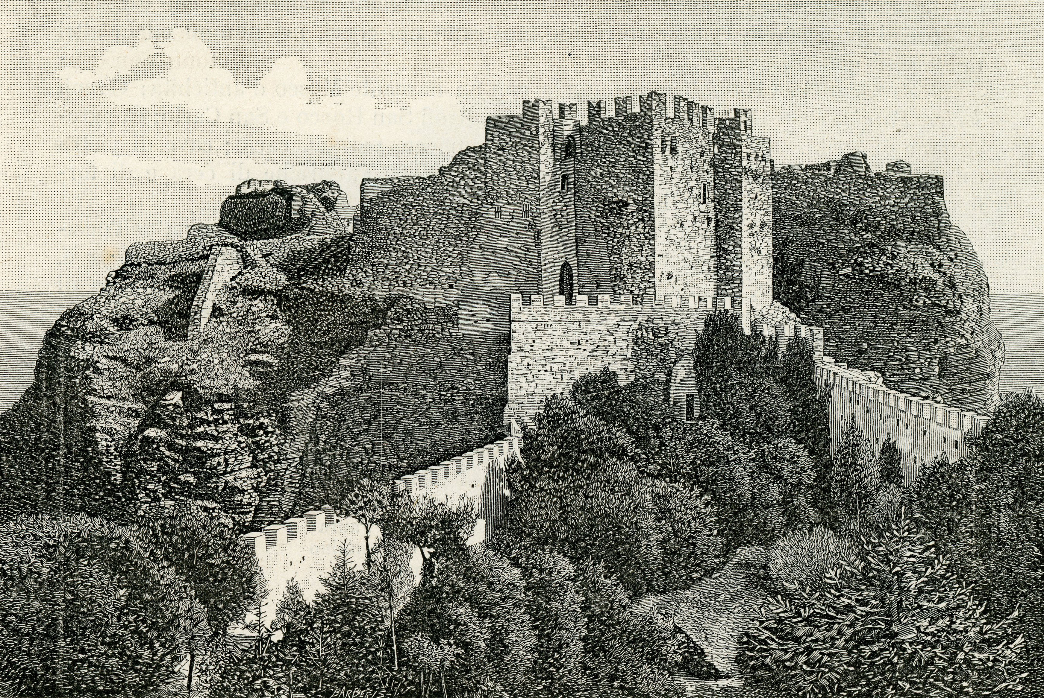 Monte San Giuliano: castello, nell’aria del delubro astartico (xilografia di Barberis 1892).